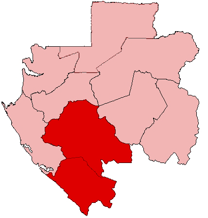 Mappa della diocesi cattolica di Mouila, in Gabon